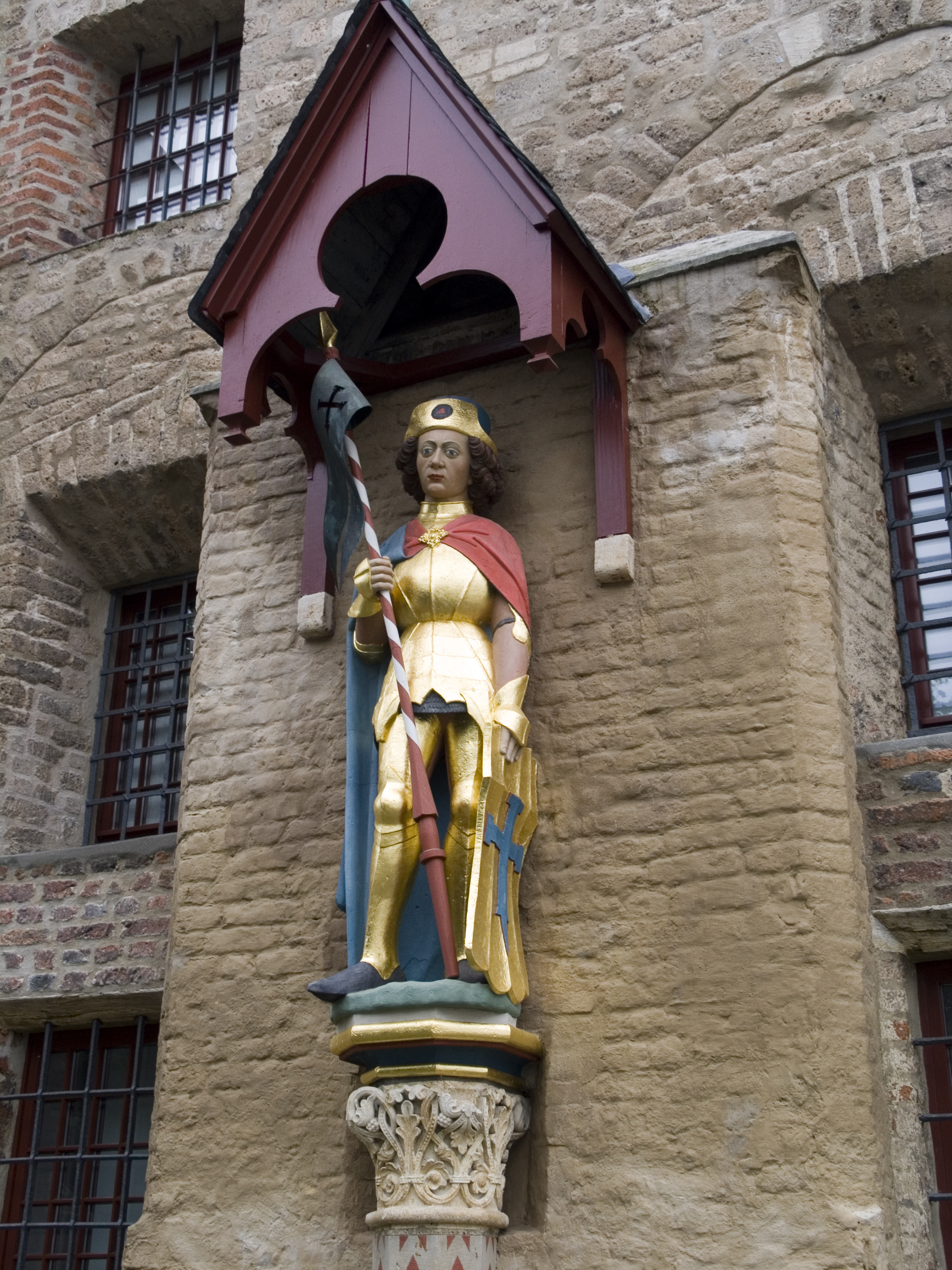 Северный Рейн - Вестфалия, Ксантен - собор Святого Виктора